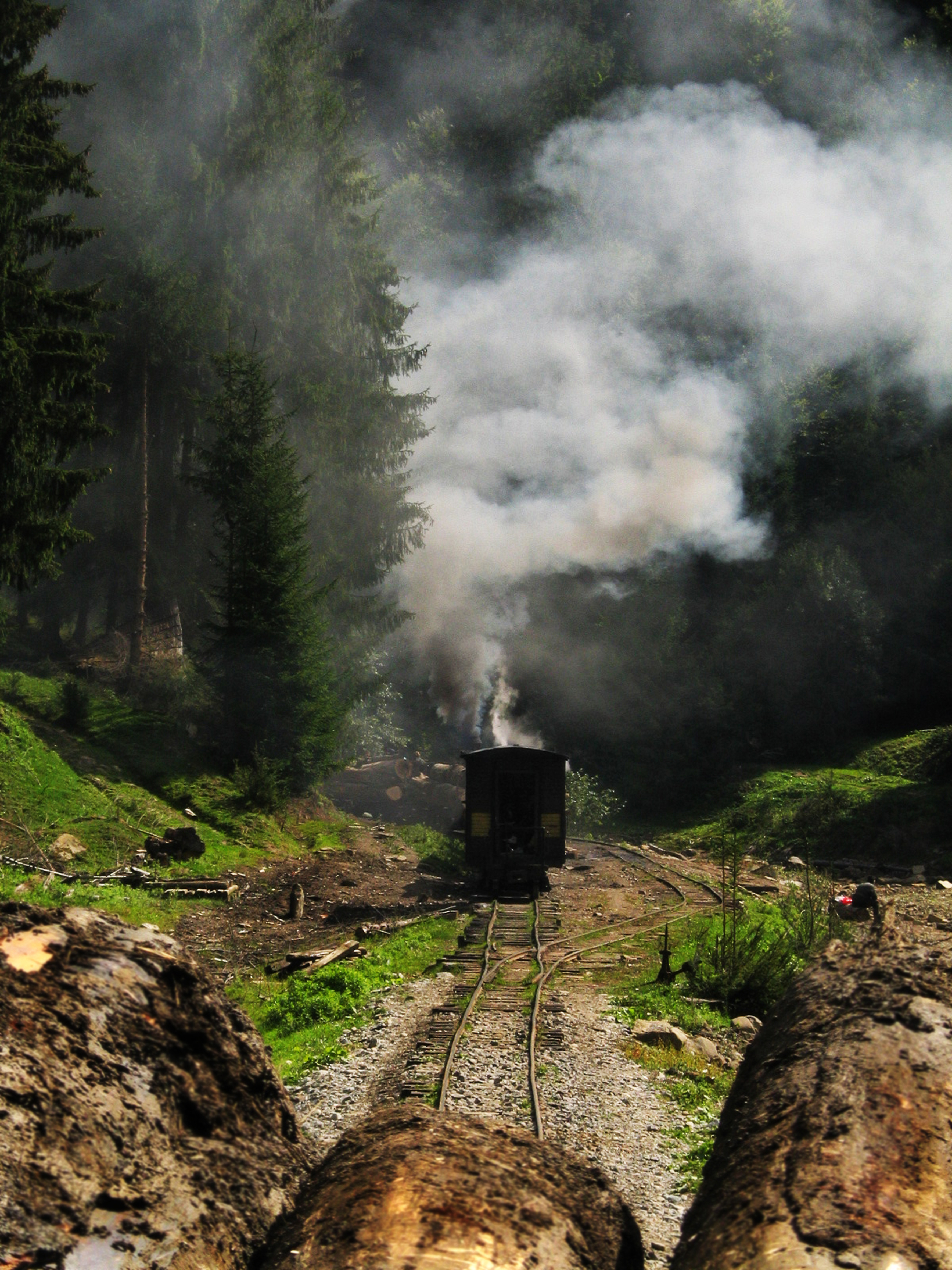 Calea ferata ingusta de pe Valea Vaseului, Maramures (Viseul de sus-Faina) 21